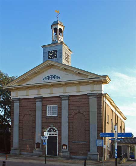 De hervormde (waterstaats-)kerk van Laren